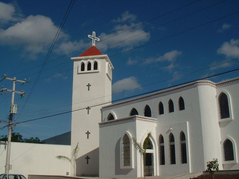 Church in Playa del Carmen, Quintana Roo, Mexico